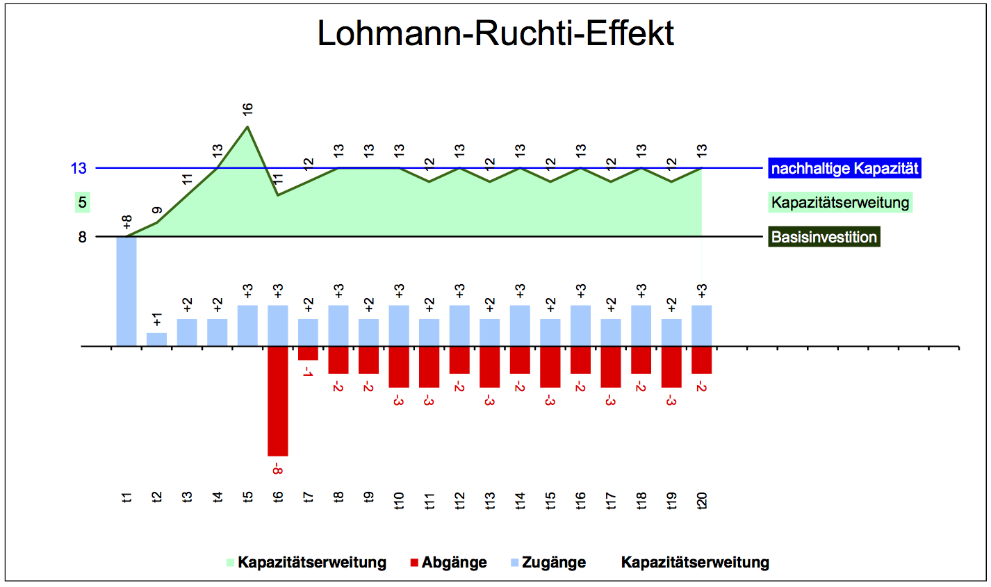 Lohmann-Ruchti-Effekt